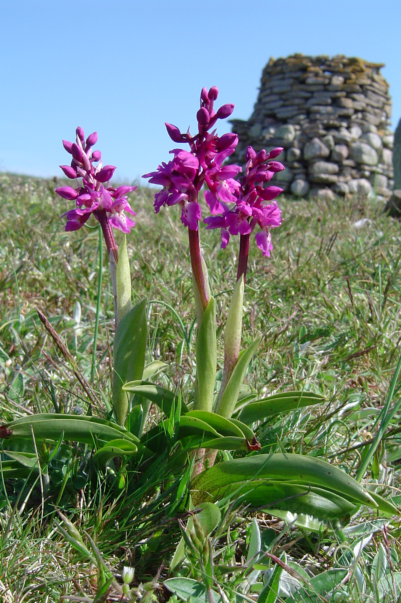 Mannetjesorchissen (Orchis mascula) in natuurreservaat Högenäs Orde op Öland